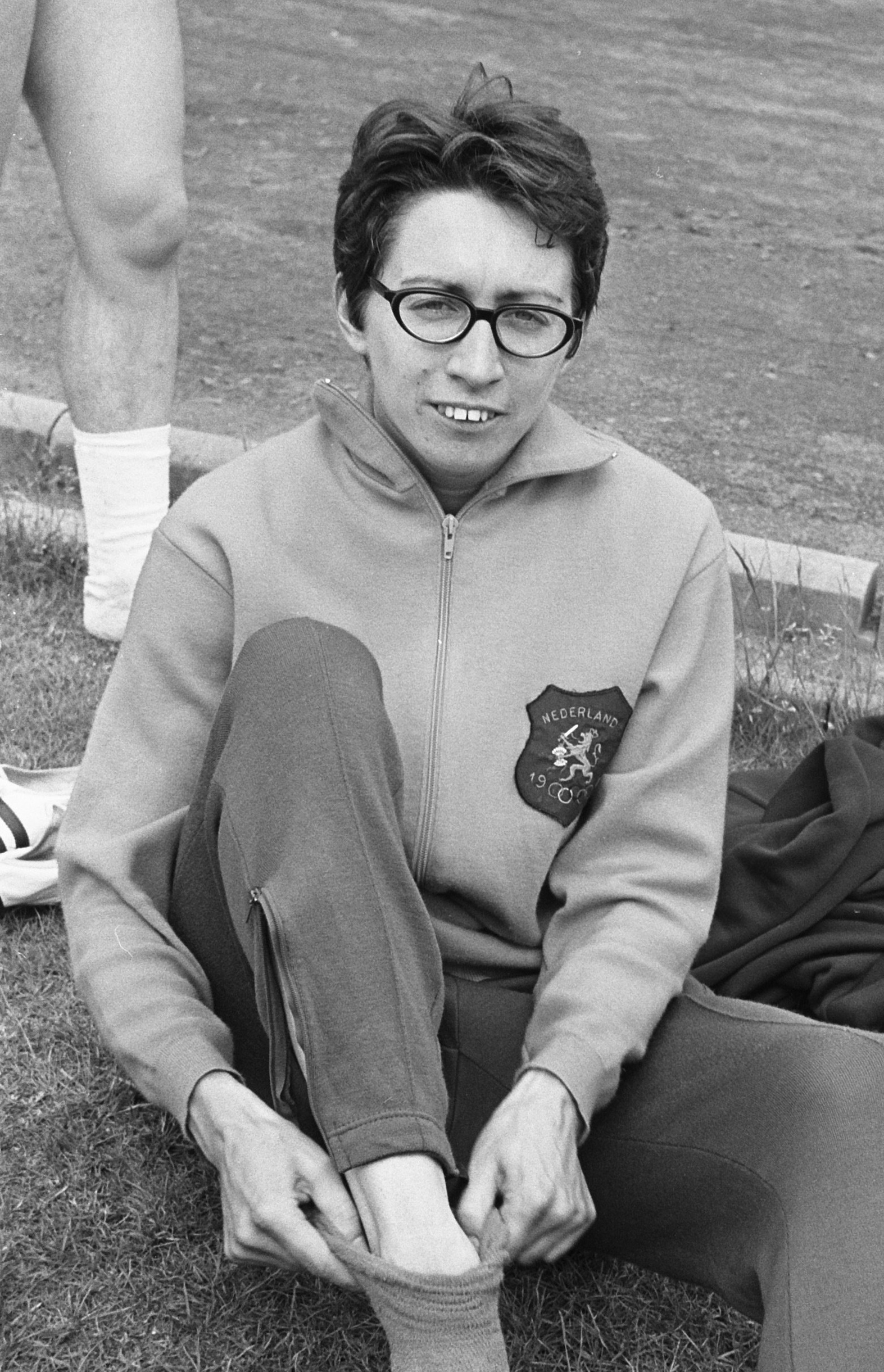 Internationale atletiekwedstrijden in Ookmeer, Amsterdam Maria Gommers winnares 1500 meter